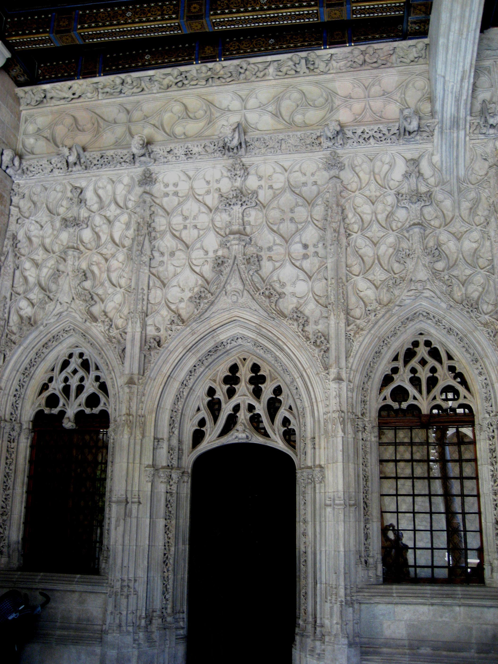 Fachada de la capilla de San Jorge del Palacio de la Generalidad de Cataluña